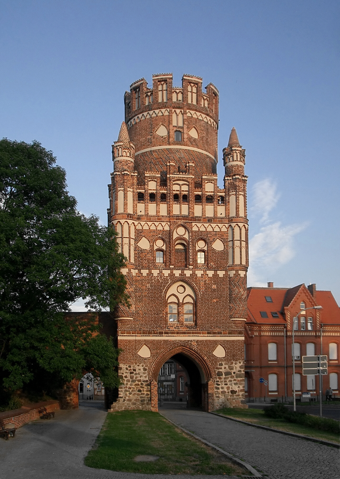 Das Uenglinger Tor in Stendal